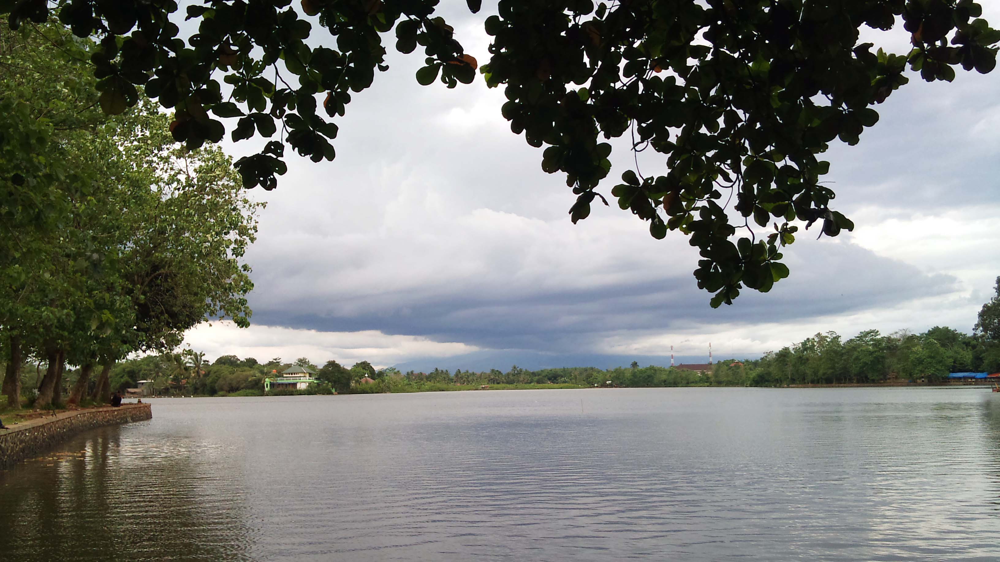 Setu Cikaret, Harapan Jaya, Cikaret, Cibinong, Bogor, Jawa Barat